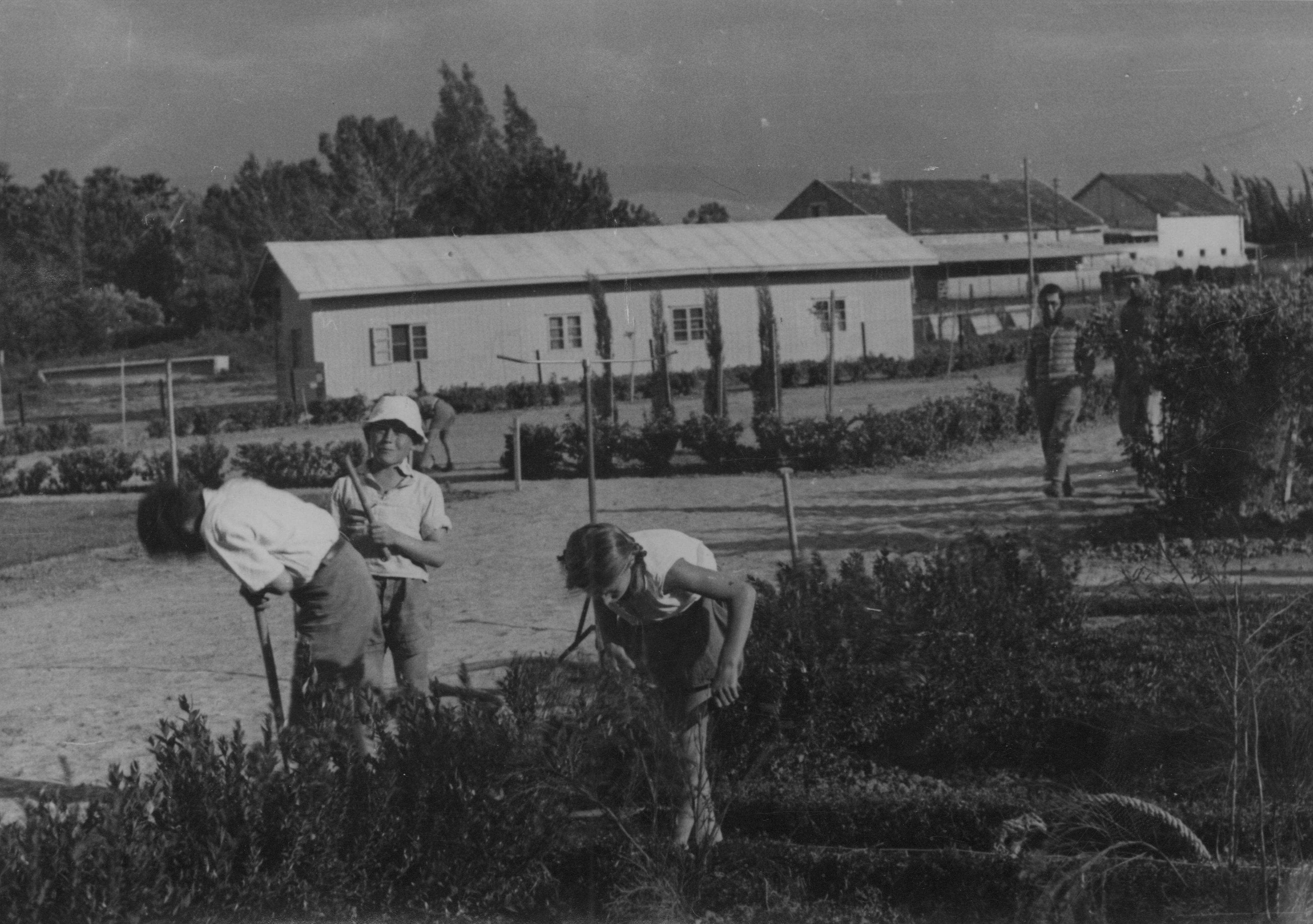 תמונה היסטורית של בית החינוך המשותף דגניה שהוא בית ספר שמונה-שנתי הנמצא בקיבוץ דגניה א' שבעמק הירדן. בית החינוך, שנוסד בשנות ה-20 של המאה ה-20, הוא בית הספר הקיבוצי הראשון.